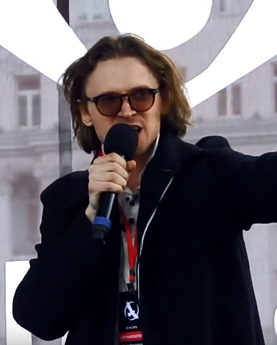 Михаил Светов, член Федерального комитета ЛПР, выступает на митинге против запрета Telegram